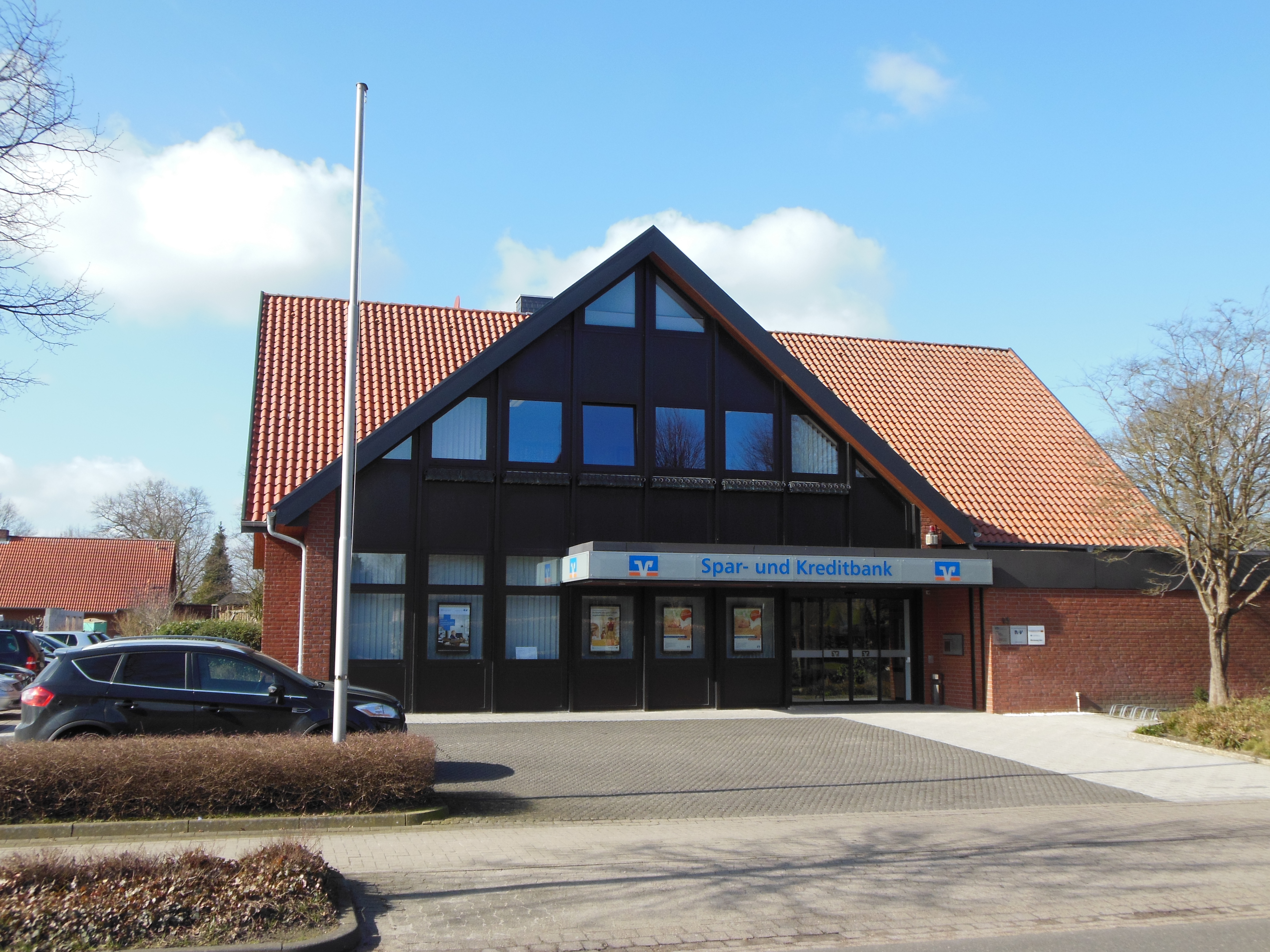 Hauptstelle der Spar- und Kreditbank eG, Bahnhofstraße 43, 21714 Hammah, Deutschland